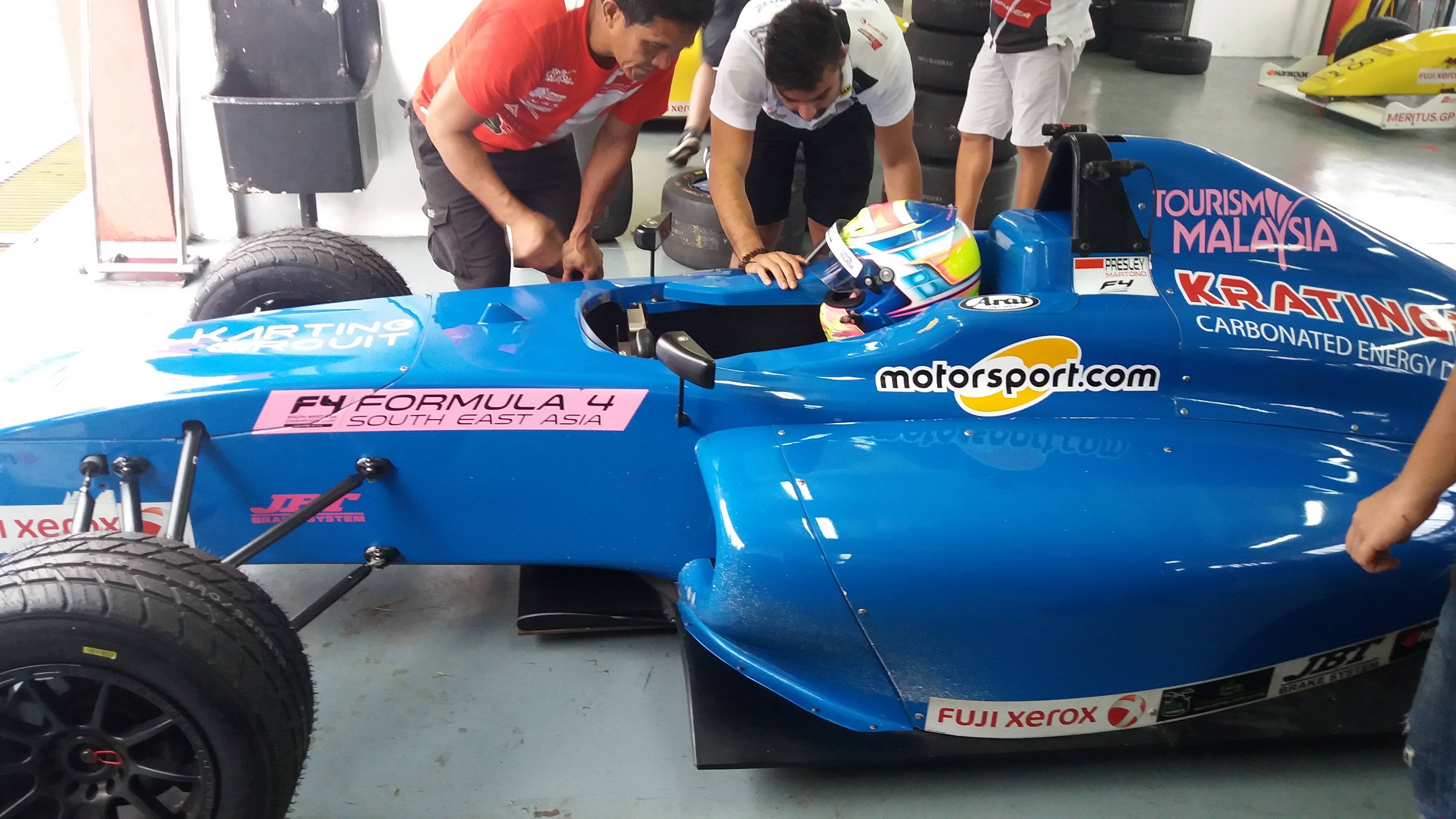 Presley Martono di Sentul